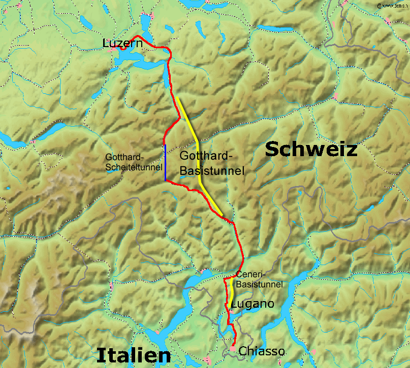 Karte der Gotthardachse der Neuen Eisenbahn-Alpentransversale NEAT Sonstiges: Die auf dem Quellbild eingezeichnete Lage des Gotthard-Scheiteltunnels entspricht nicht der Realität, der Tunnel scheint in Wassen UR zu beginnen, tatsächlich liegt das Nordportal in Göschenen UR